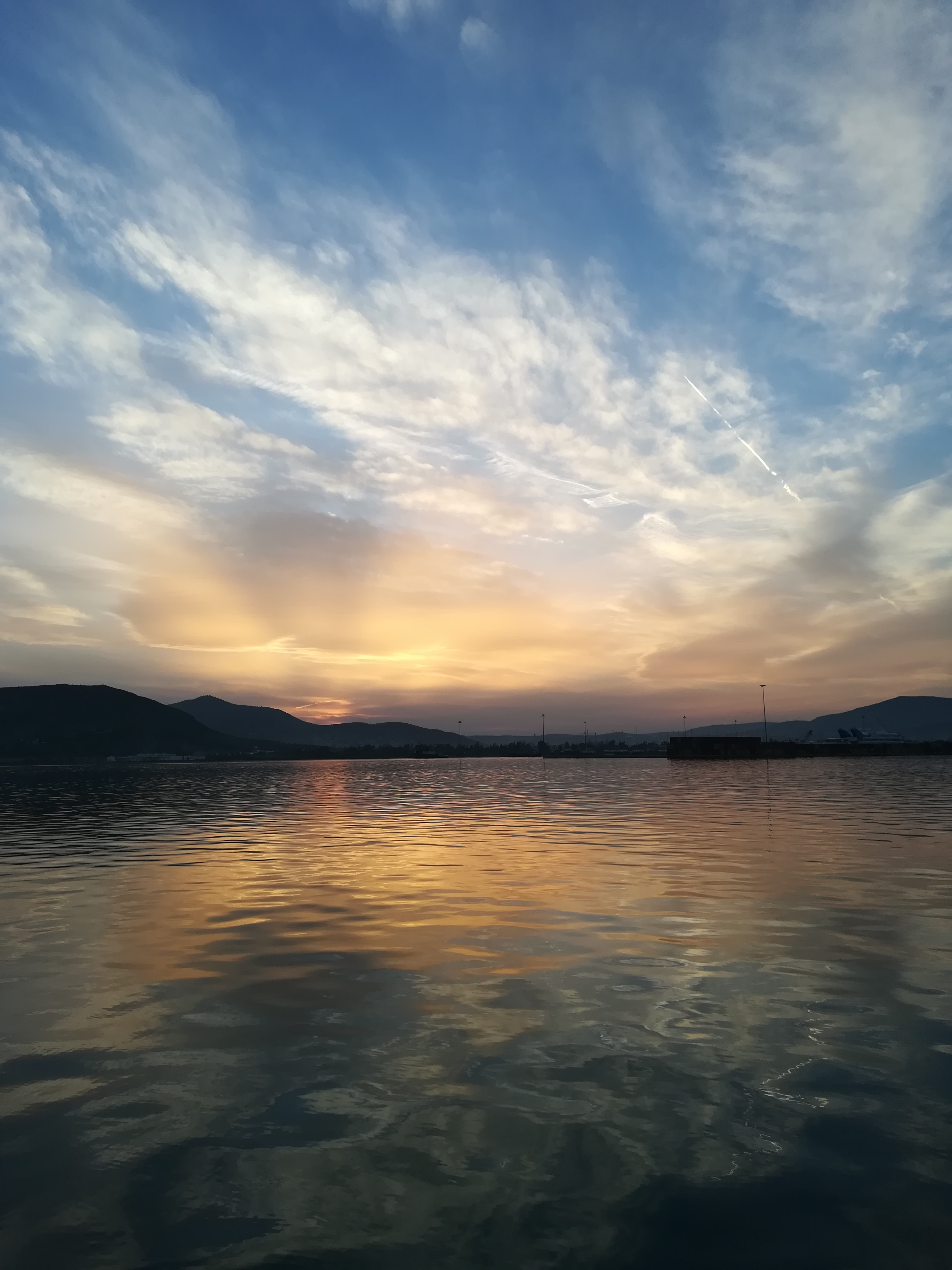 Άποψη του λιμανιού του Βόλου